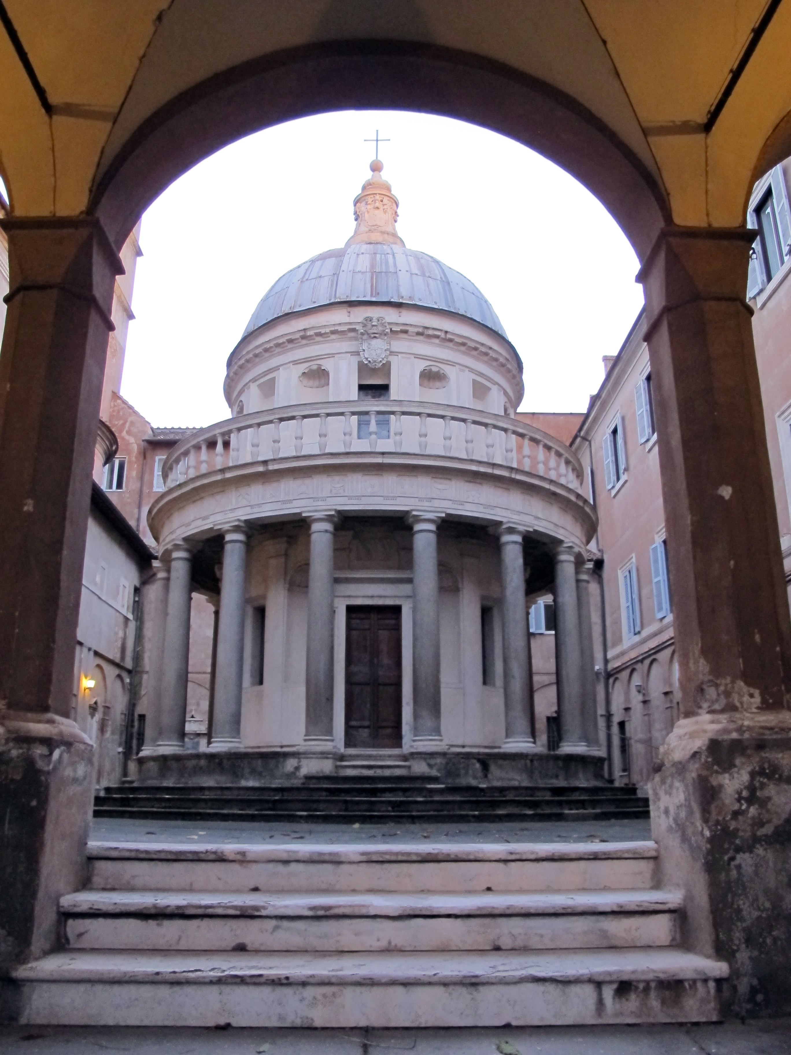 Roma, vedi titolo